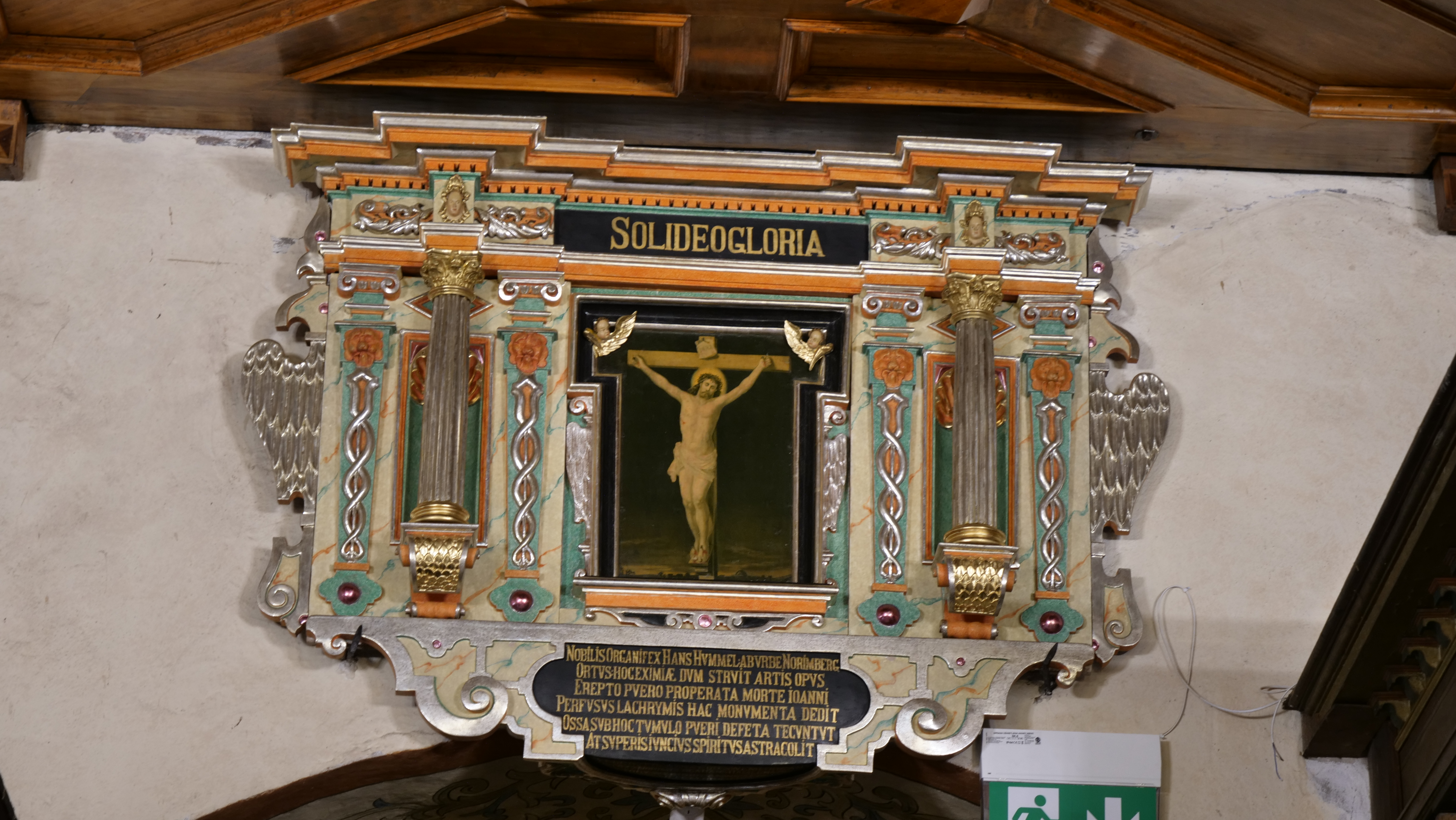 Olkusz, Pfarrkirche, Epitaph des 4-jähriges Joannes Hummel, dem Sohn Hans Hummels